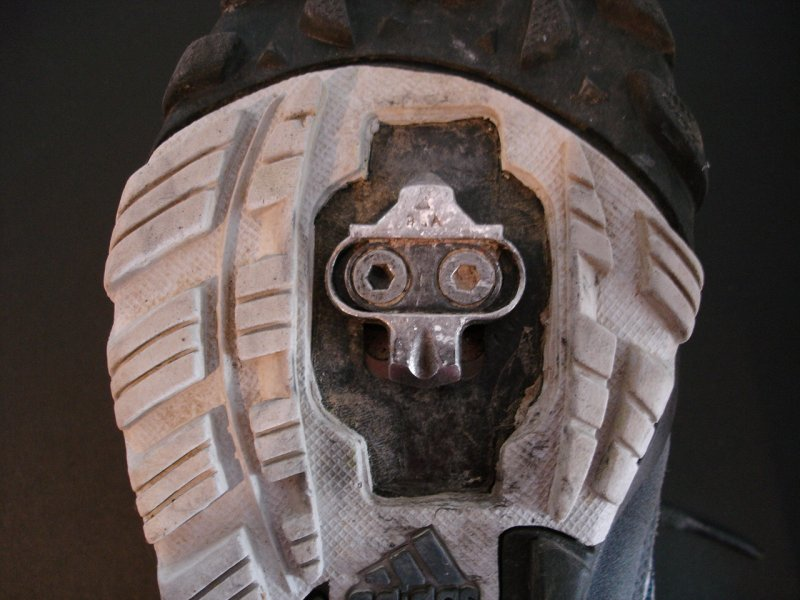 Bild eines Cleats